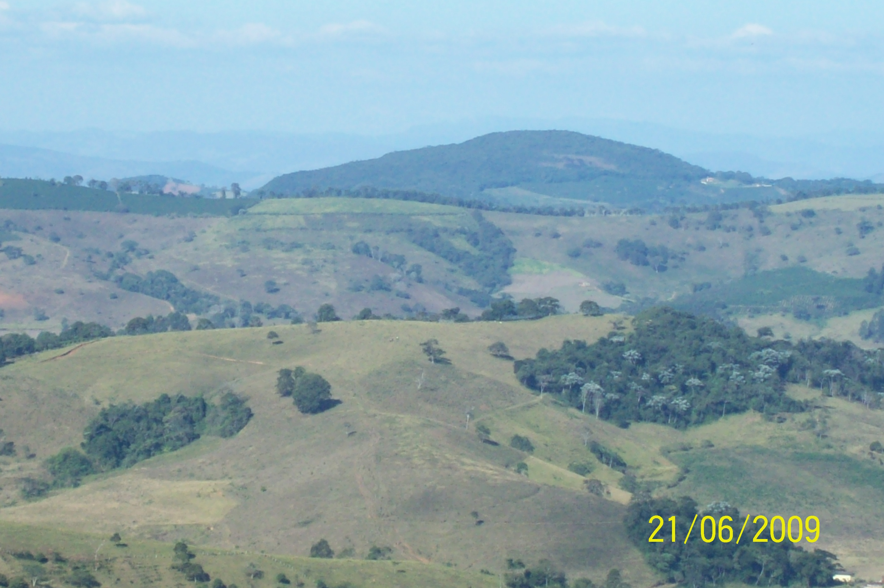 Serra_das_Folhetas_ao_fundo